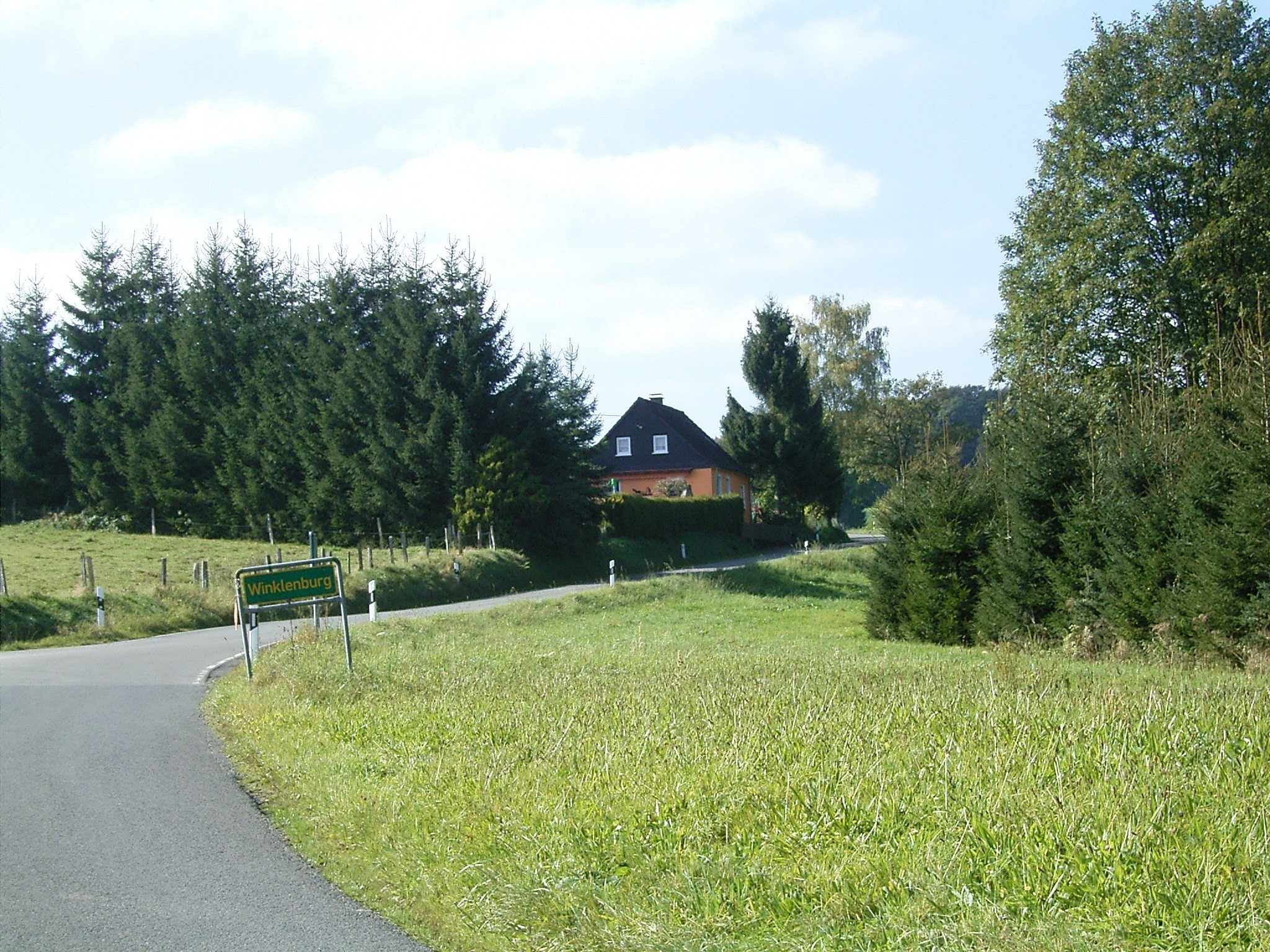 Radevormwald